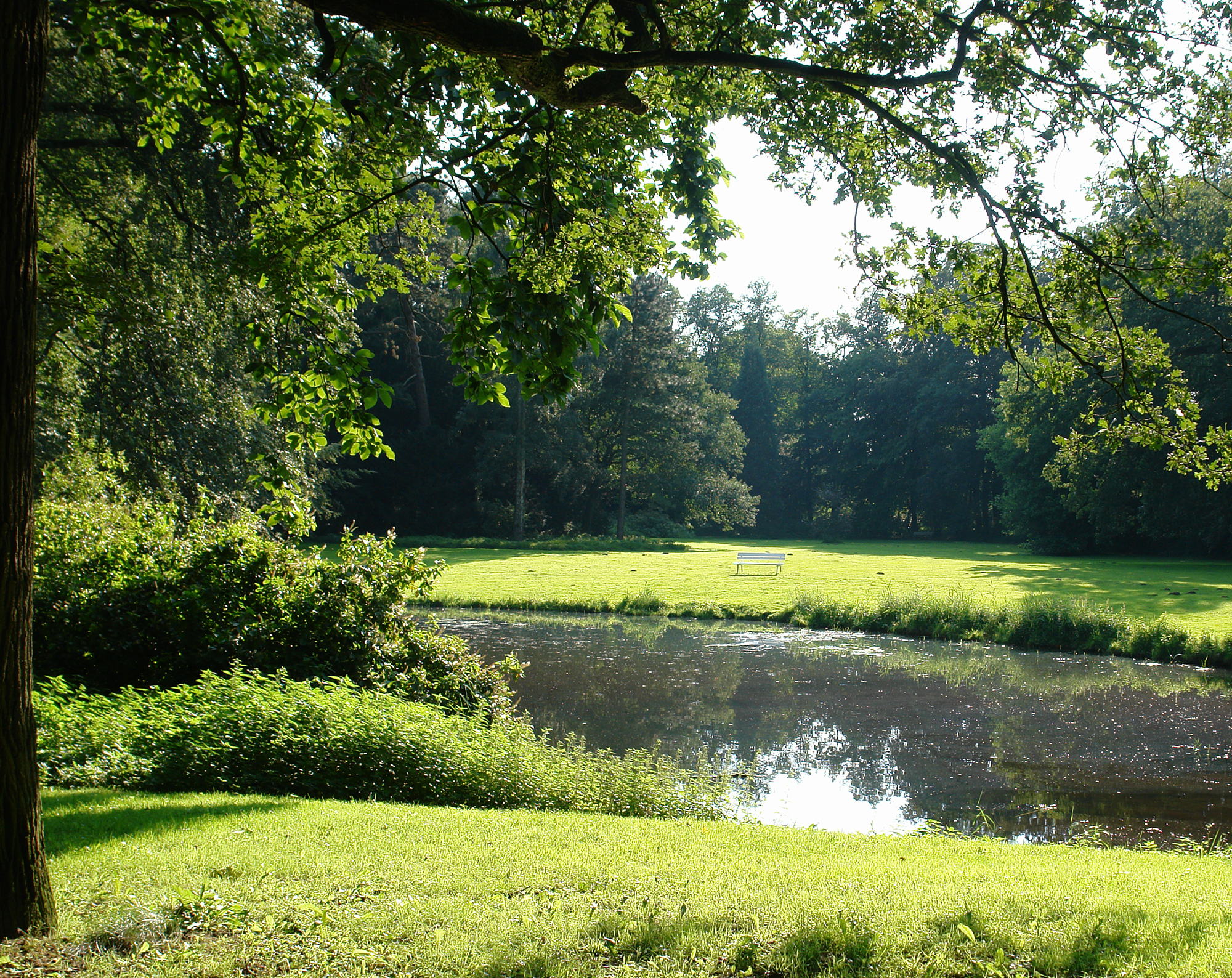 Höpkens Ruh, Landgut Schultz in Bremen, Oberneulander Landstraße 69.Die Gesamtanlage ist ein geschütztes Kulturdenkmal in der Freien Hansestadt Bremen, mit der Nr. 0609,T beim Landesamt für Denkmalpflege registriert.